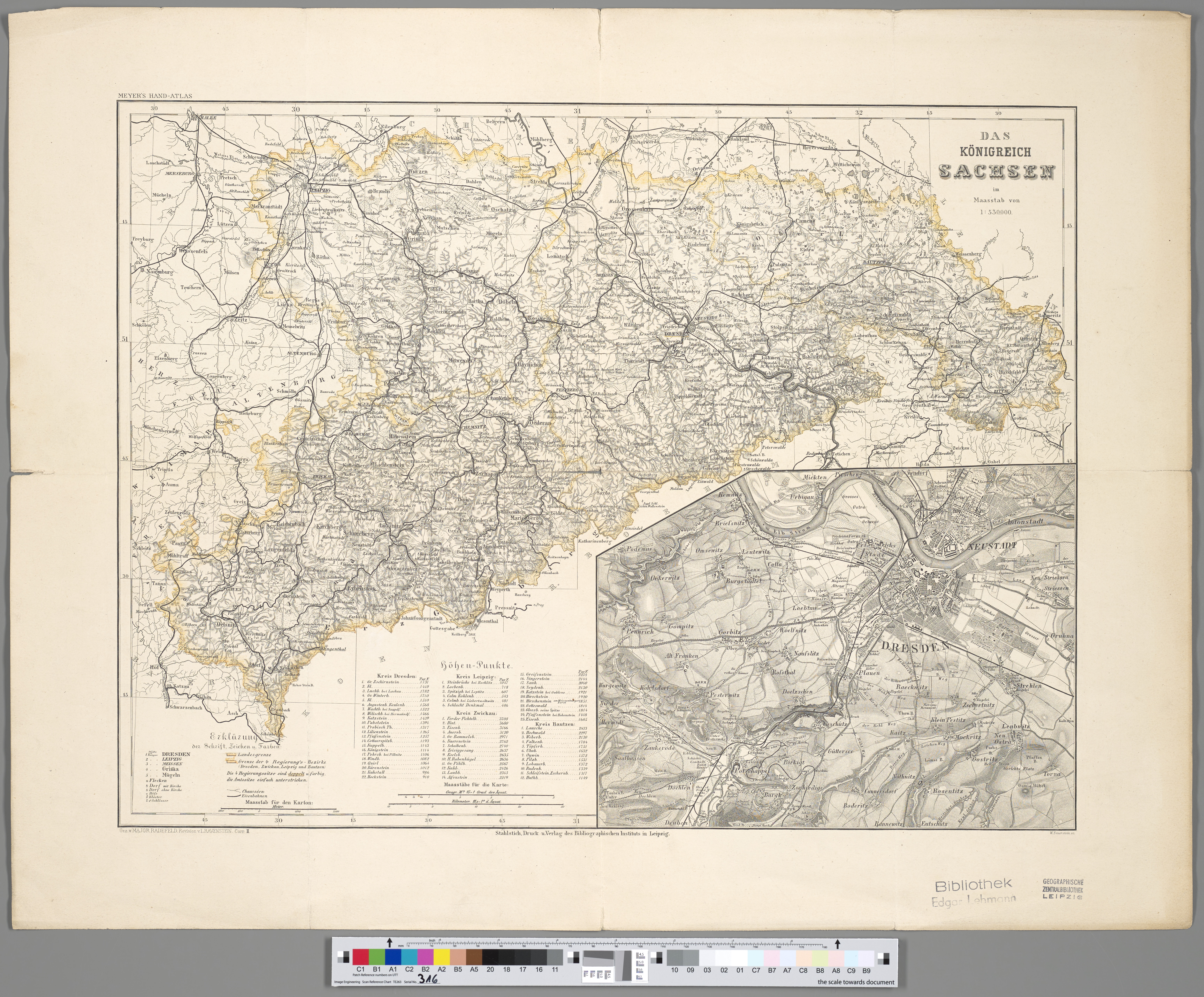 1 Kt. : Grenzen kolor. (42 x 31 cm). Maßstab 1:530.000. Koordinaten E 11°46'00"-E 14°58'00"/N 51°30'00"-N 50°10'00". Aus: Meyer's Hand-Atlas / Joseph Meyer. Maßstab in graph. Form (Geogr. M[eile]n, Kilometer). Titel oben rechts. Legende und Maßstab unten links. - Mit 1 Nebenkt.: [Dresden]. Relief: Schraffen.